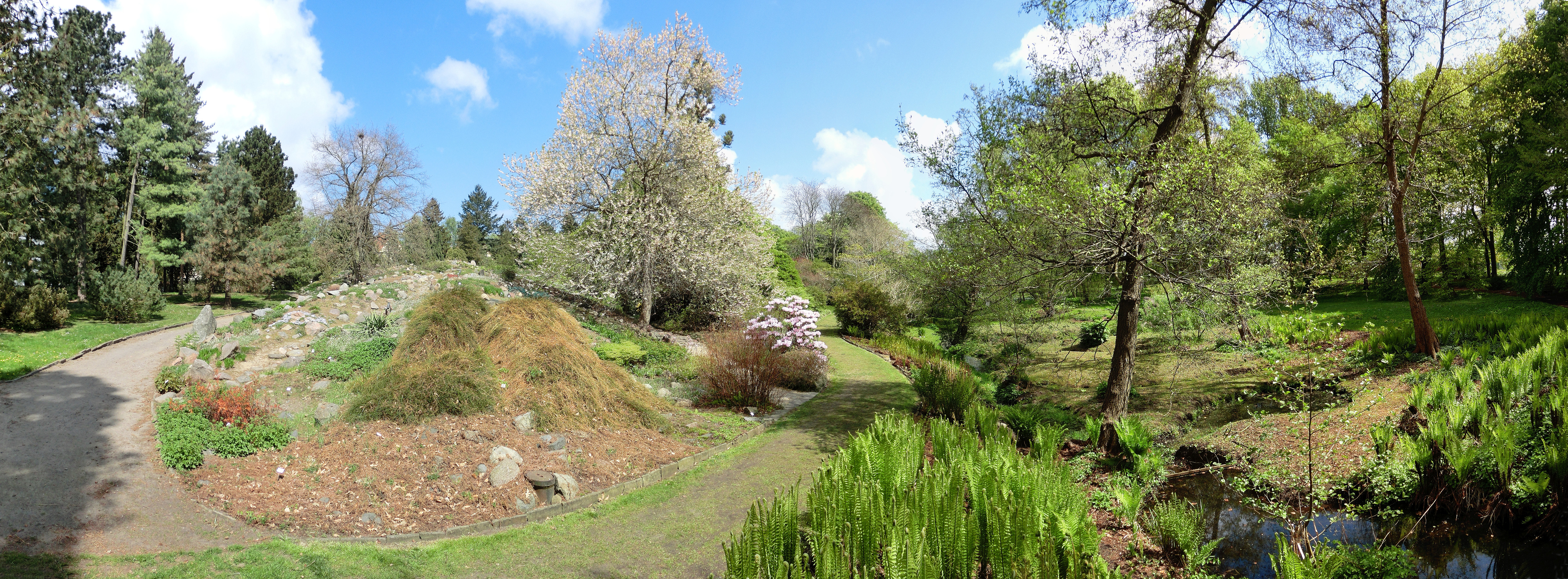 Rostock, Feuchtgebiet im Botanischen Garten